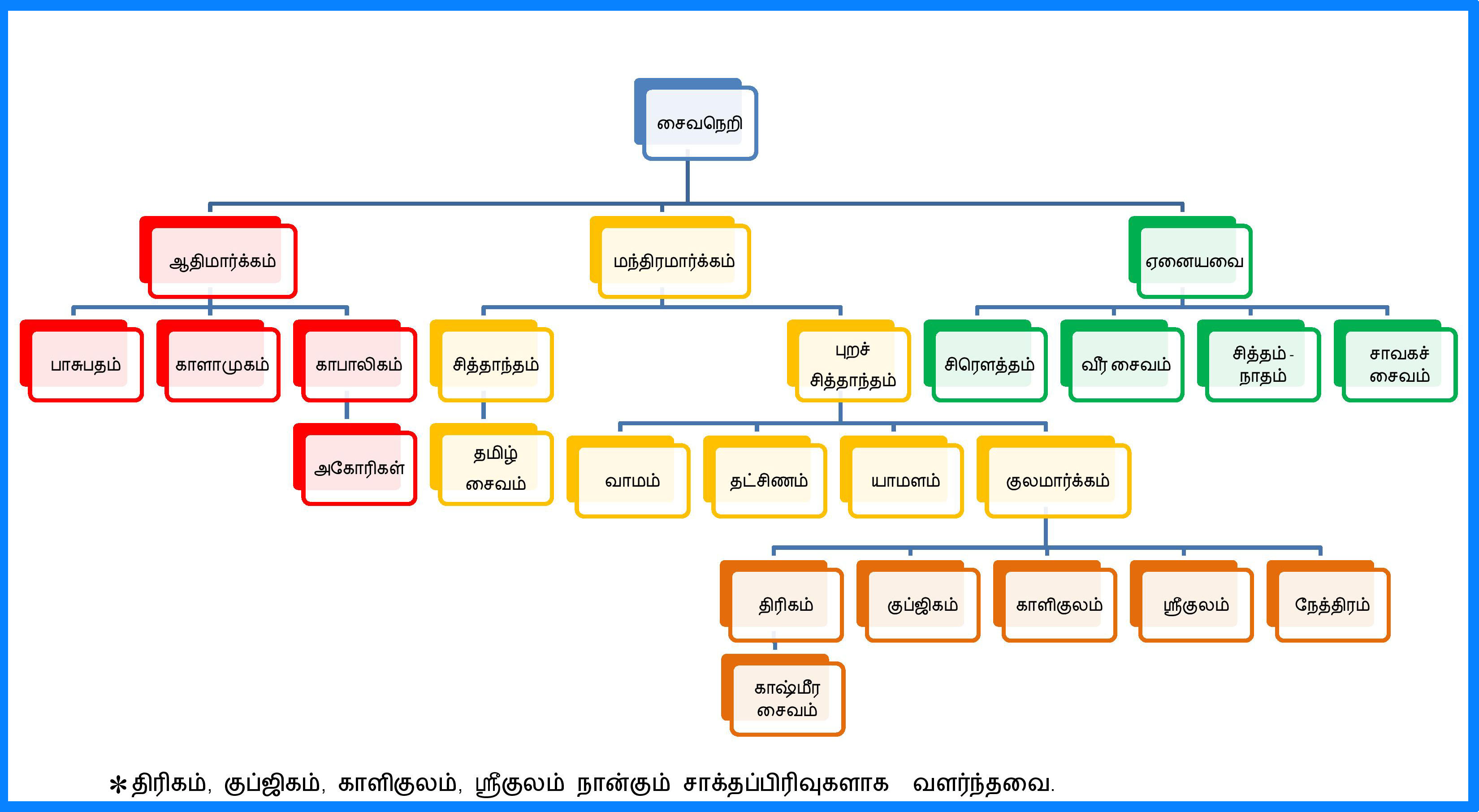 சைவம் - அதன் கிளைநெறிகளின் தோற்றமும் வளர்ச்சியும்